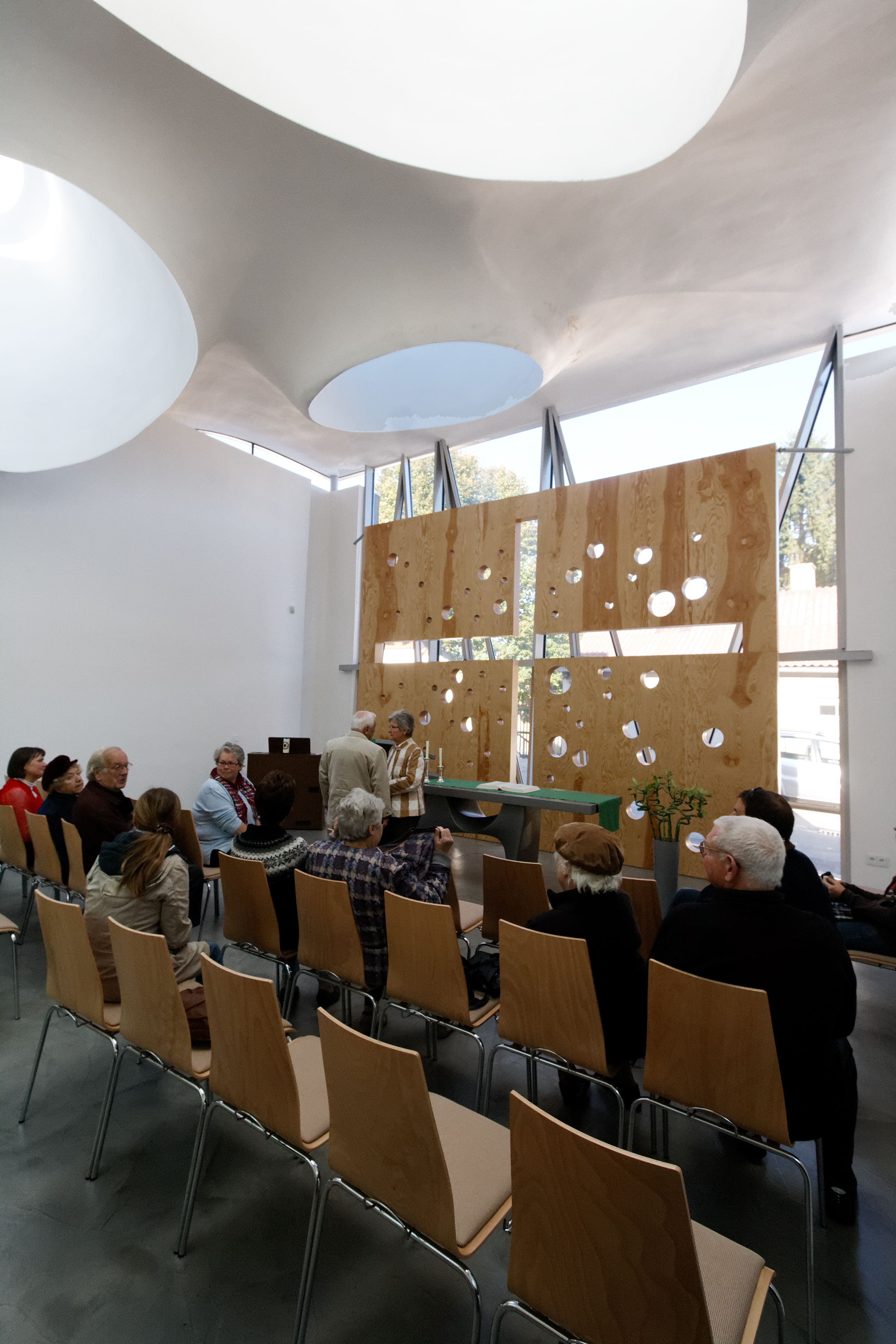 Martin-Luther-Kirche in Hainburg an der Donau (Niederösterreich), errichtet nach Plänen von Wolf D. Prix vom Architekturbüro Coop Himmelb(l)au, eingeweiht am 30. April 2011.